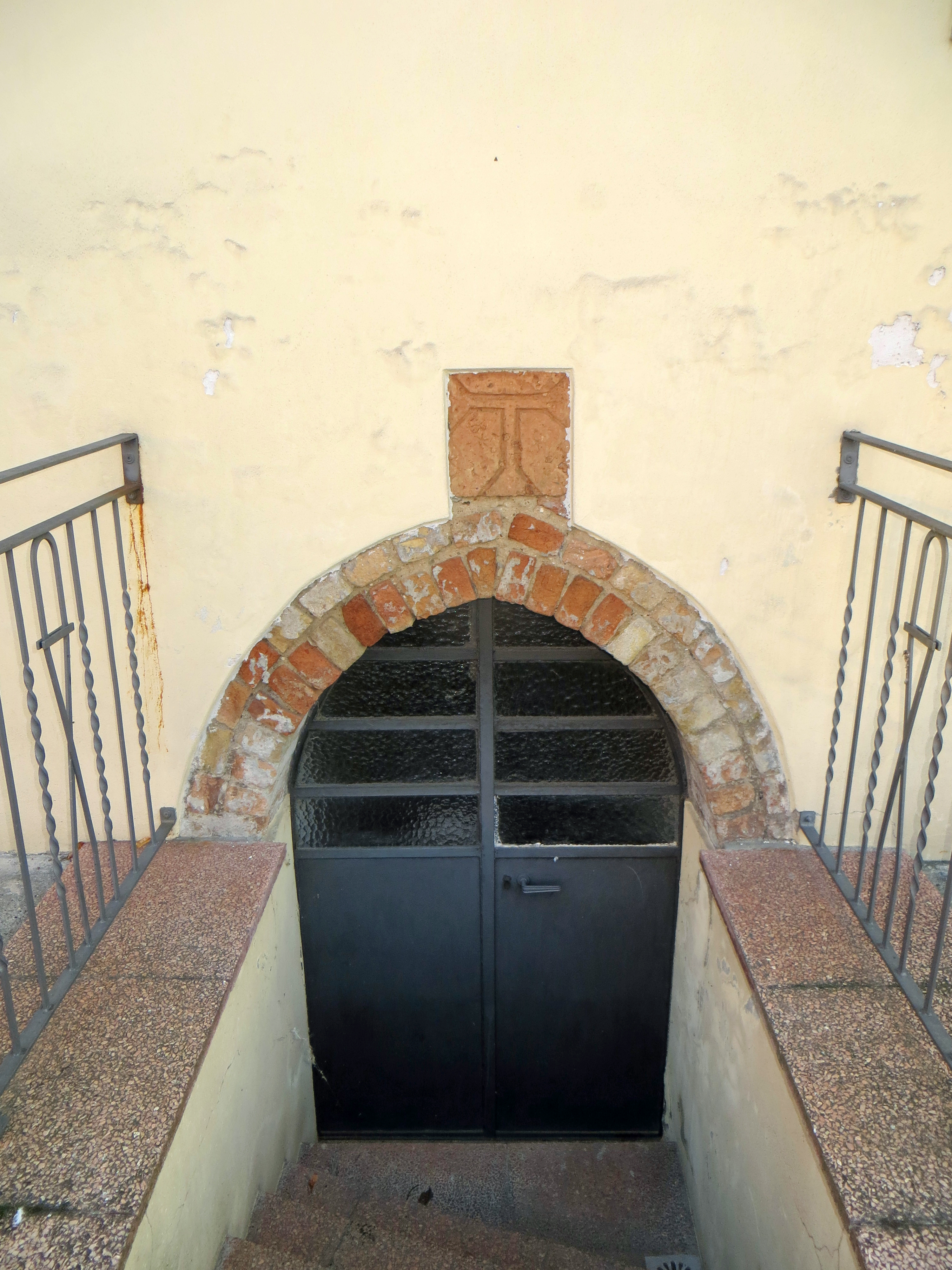 Chiesa di Sant'Antonio Abate (Fidenza) - antico ingresso sul lato nord